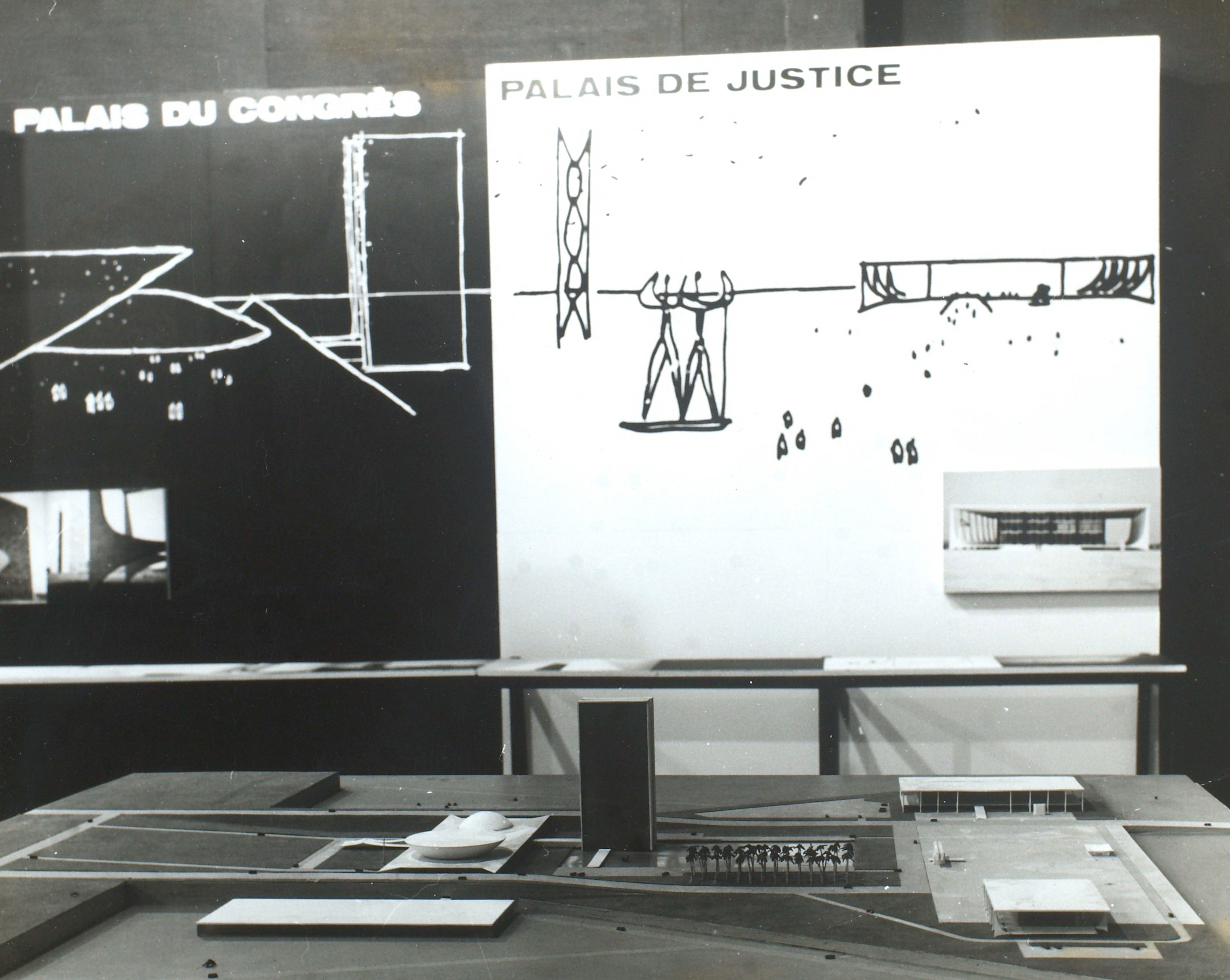 Fotografia do Fundo Correio da Manhã, sob a guarda do Arquivo Nacional.